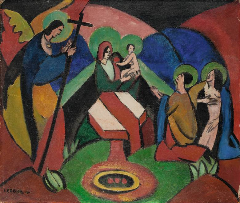 Verehrung. Öl auf Pappe. 27 x 32 cm